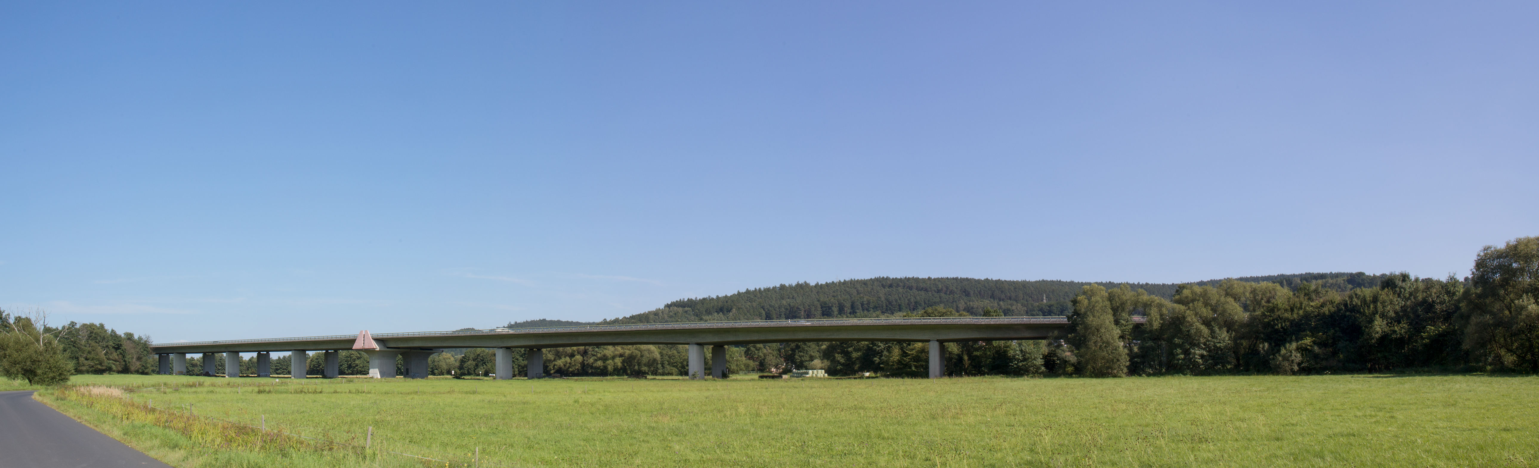 Kinzigtalbrücke, 985 Meter lange, vierspurige Autobahnbrücke der A 66. Sie befindet sich in Bad Soden-Salmünster in Hessen und ist Hessens längste Autobahnbrücke.